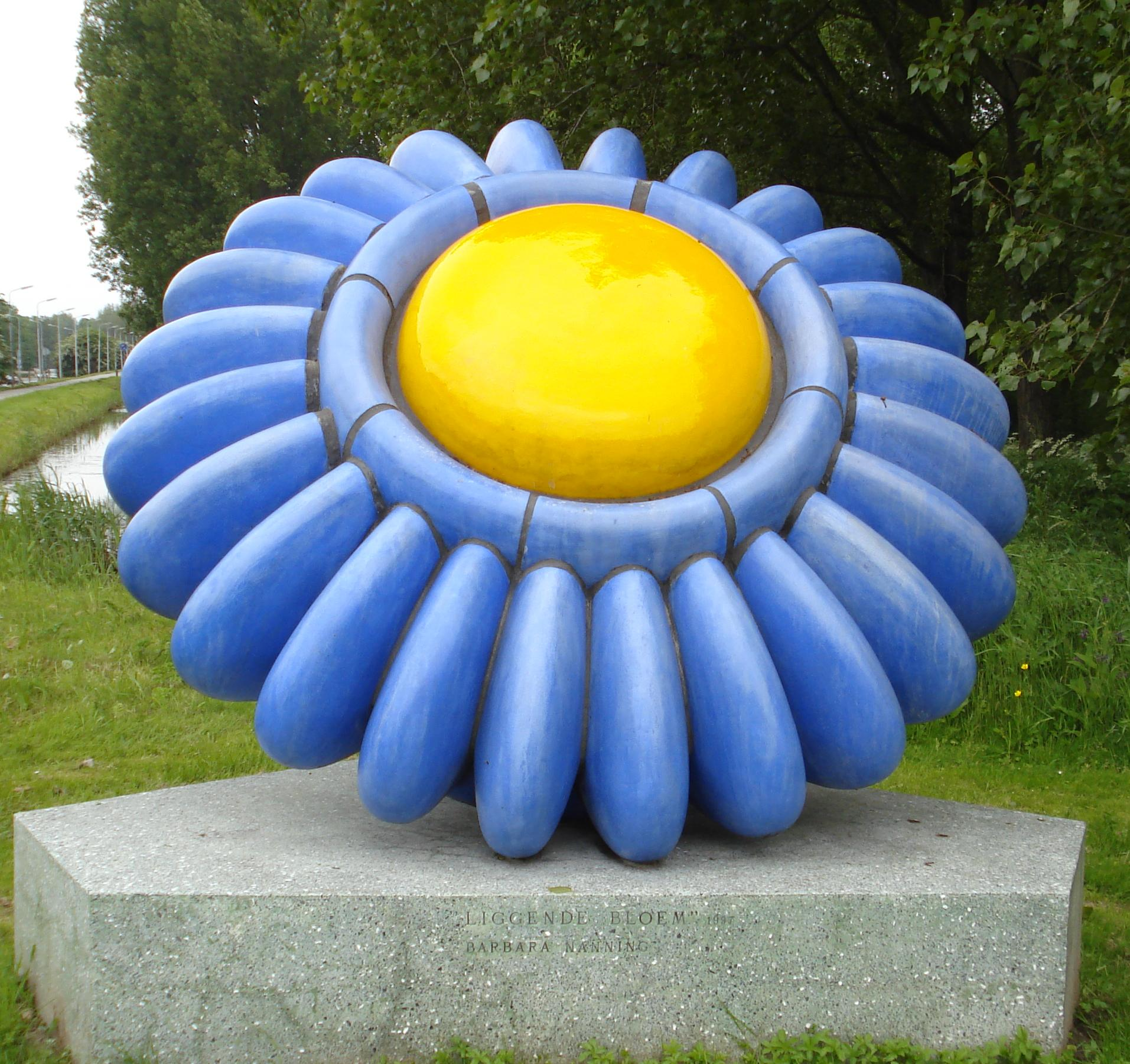 Aalsmeer, Legmeerdijk / Hornmeerpark. Kunstwerk "Liggende bloem" van Barbara Nanning. The Netherlands. The photographical reproduction of this work is covered under the article 18 of the Dutch copyright law, which states that “it is not an infringement of copyright to reproduce and publish pictures of a work, as meant in article 10, first paragraph, under 6°[1] or of an architectural work as meant in article 10, first paragraph, under 8°[2], which are made to be permanently located in a public place, as long as the work is depicted as it is located in the public space. Where incorporation of a work in a compilation is concerned, not more than a few of the works of the same author may be included”. [1] drawings, paintings, works of architecture and sculpture, lithographs, engravings and the likes [2] drafts, sketches and three-dimensional works relating to architecture, geography, topography or other sciences Note that photographs are not included in Item 6. They are separately listed at Item 9 and are therefore not covered by FOP. See COM:CRT/Netherlands#Freedom of panorama for more information. .